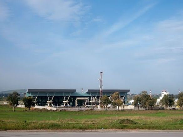 Taher Ferhat Abbas Airport, The Arrival